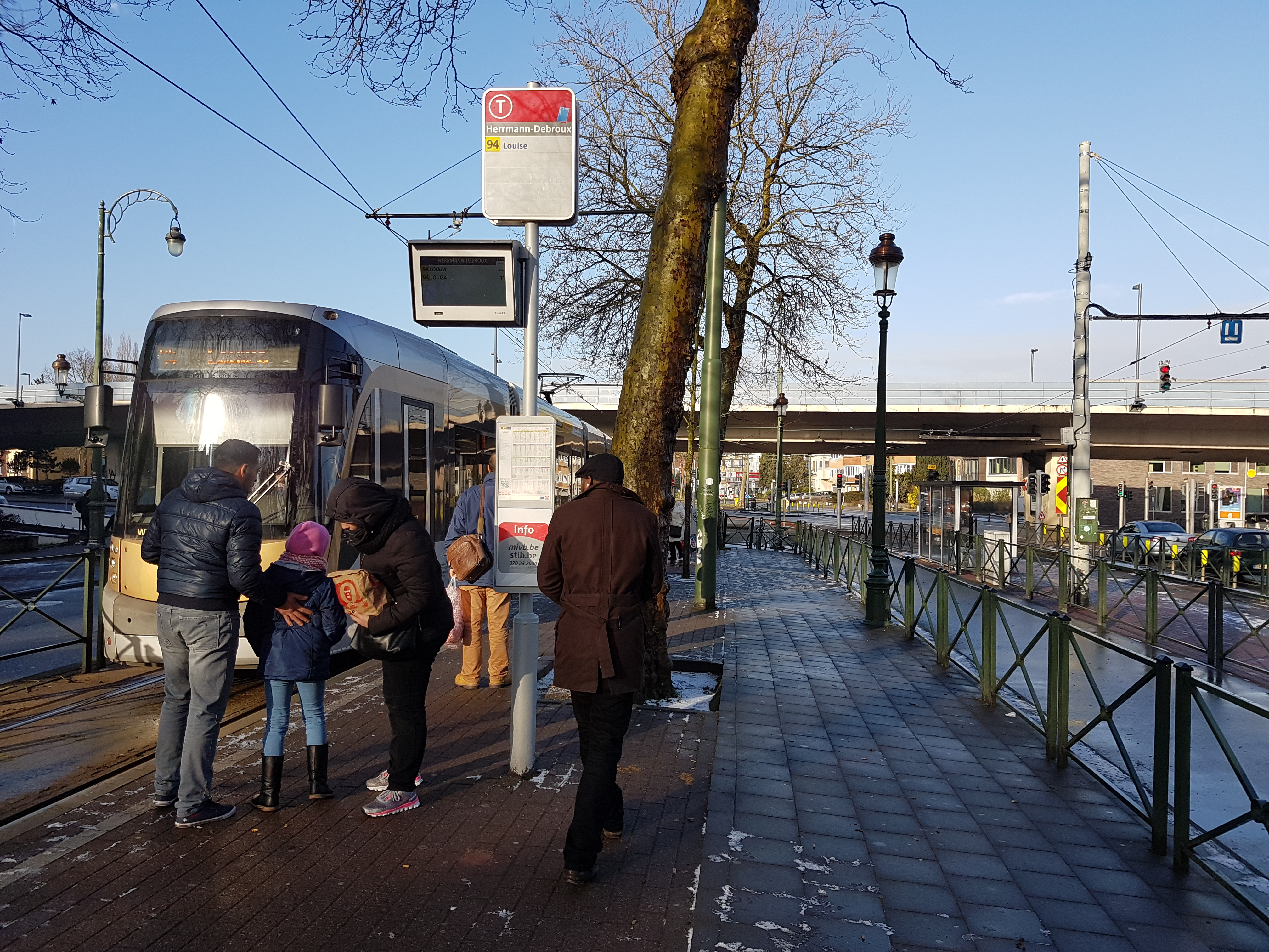 Correspondance avec le tram 94 à la station de métro Herrmann-Debroux